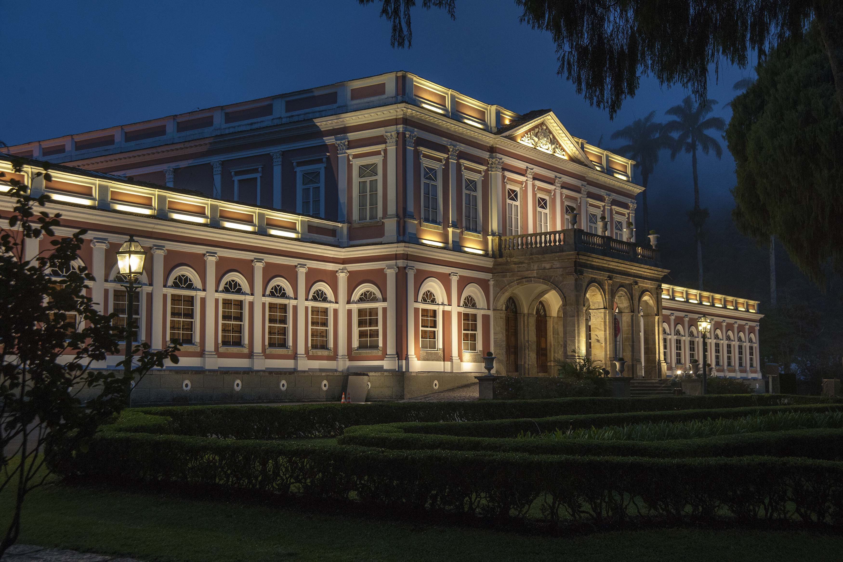 Palácio Imperial de Petrópolis, parque e Quartel dos Semanários